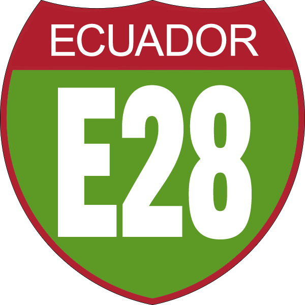 Disco de Identificación Ruta E28